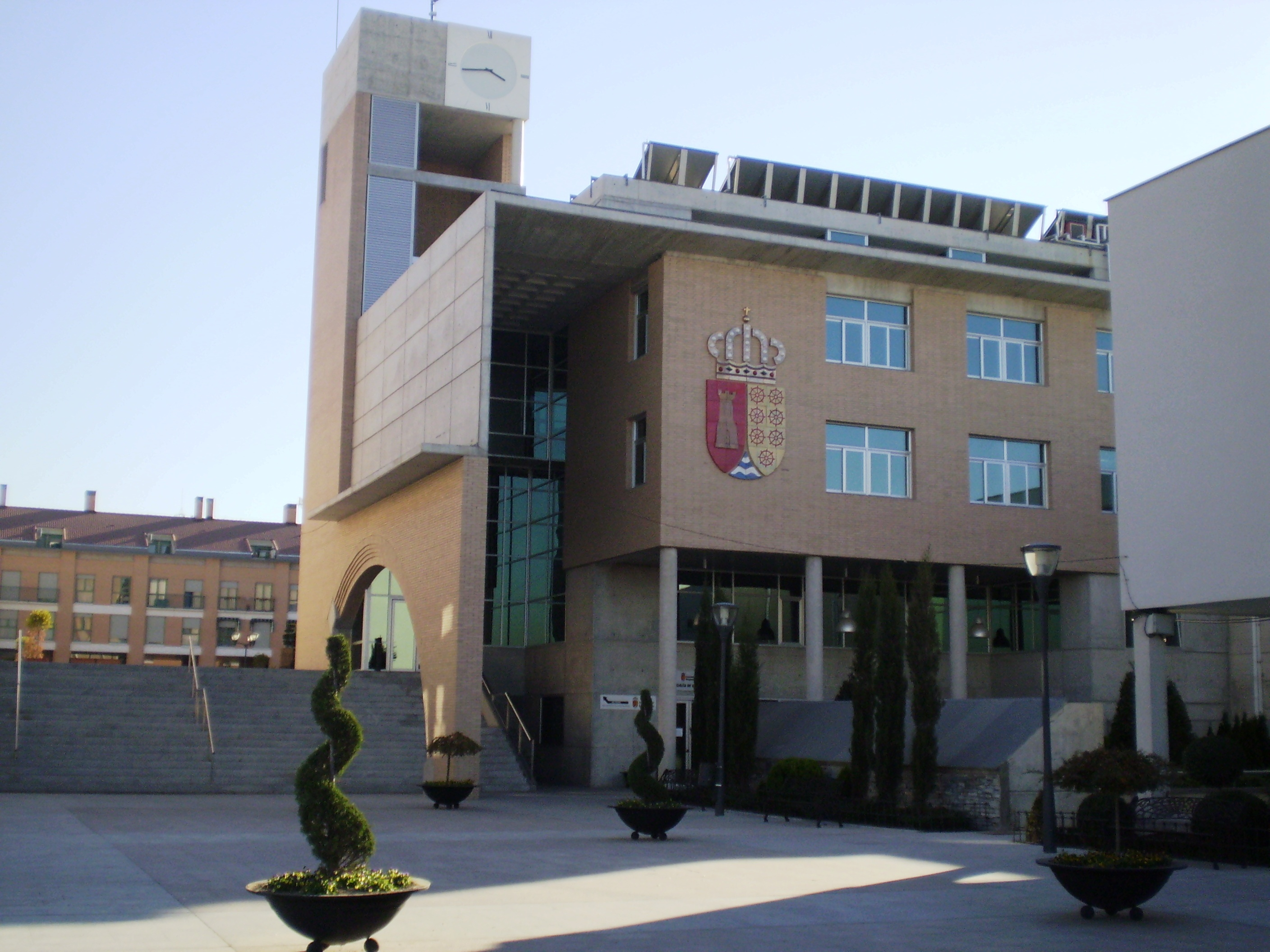 Arroyomolinos, Madrid, Spain (new ayuntamiento since 2004)